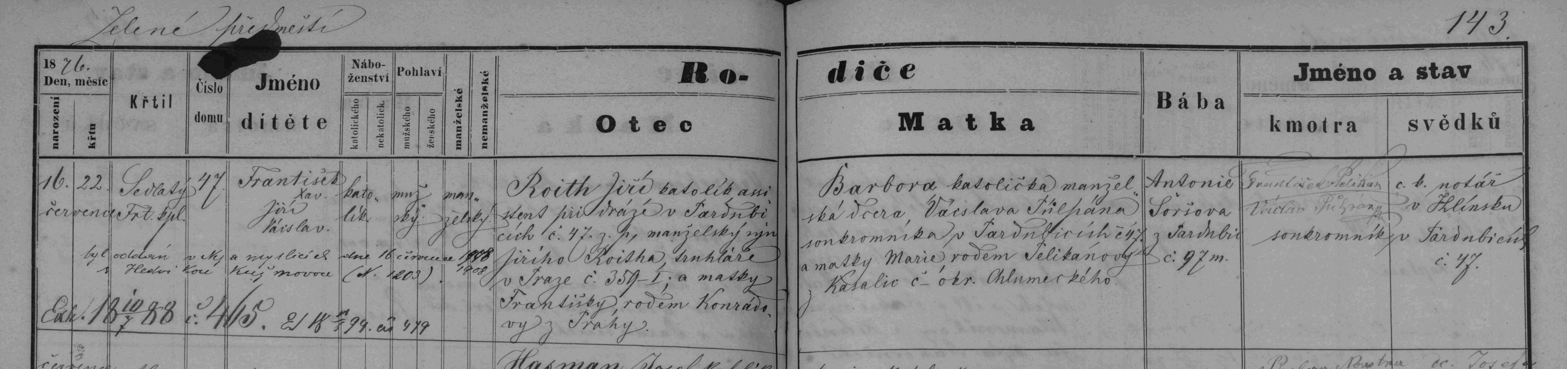 zápis narození Františka Rotha (matrika N 1872-1880 Zelené Předměstí, SOA Zámrsk)